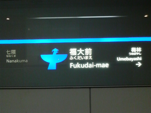 福岡市地下鉄七隈線福大前駅の駅名標